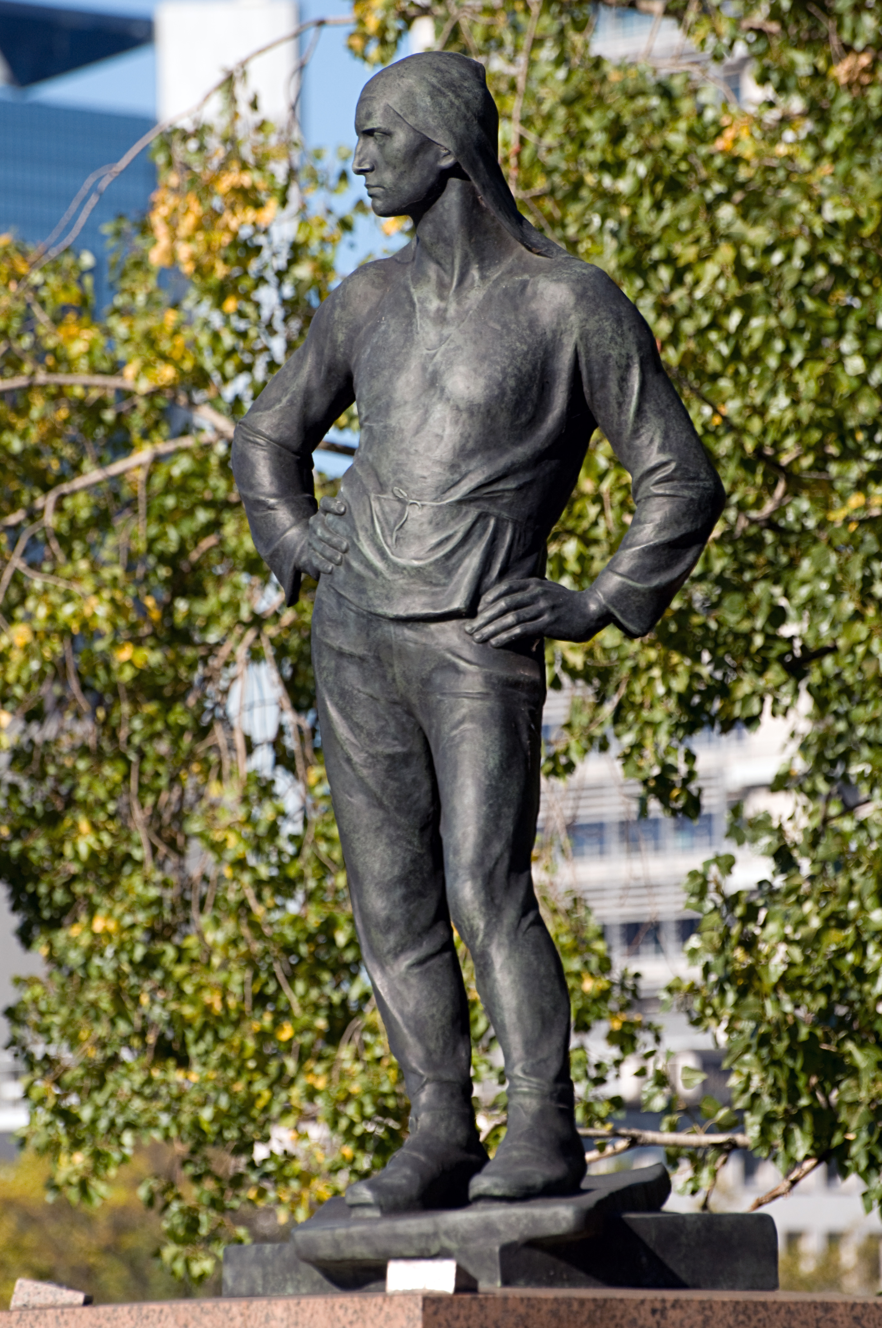 Der Hafenarbeiter